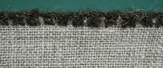 Saumnachbildung der Halsschnur von Bunsoh, einem Kleidungsbestandteil der Moorleiche von Bunsoh, die 1890 im Schalkholzer Moor, bei Albersdorf im Kreis Dithmarschen gefunden wurde.